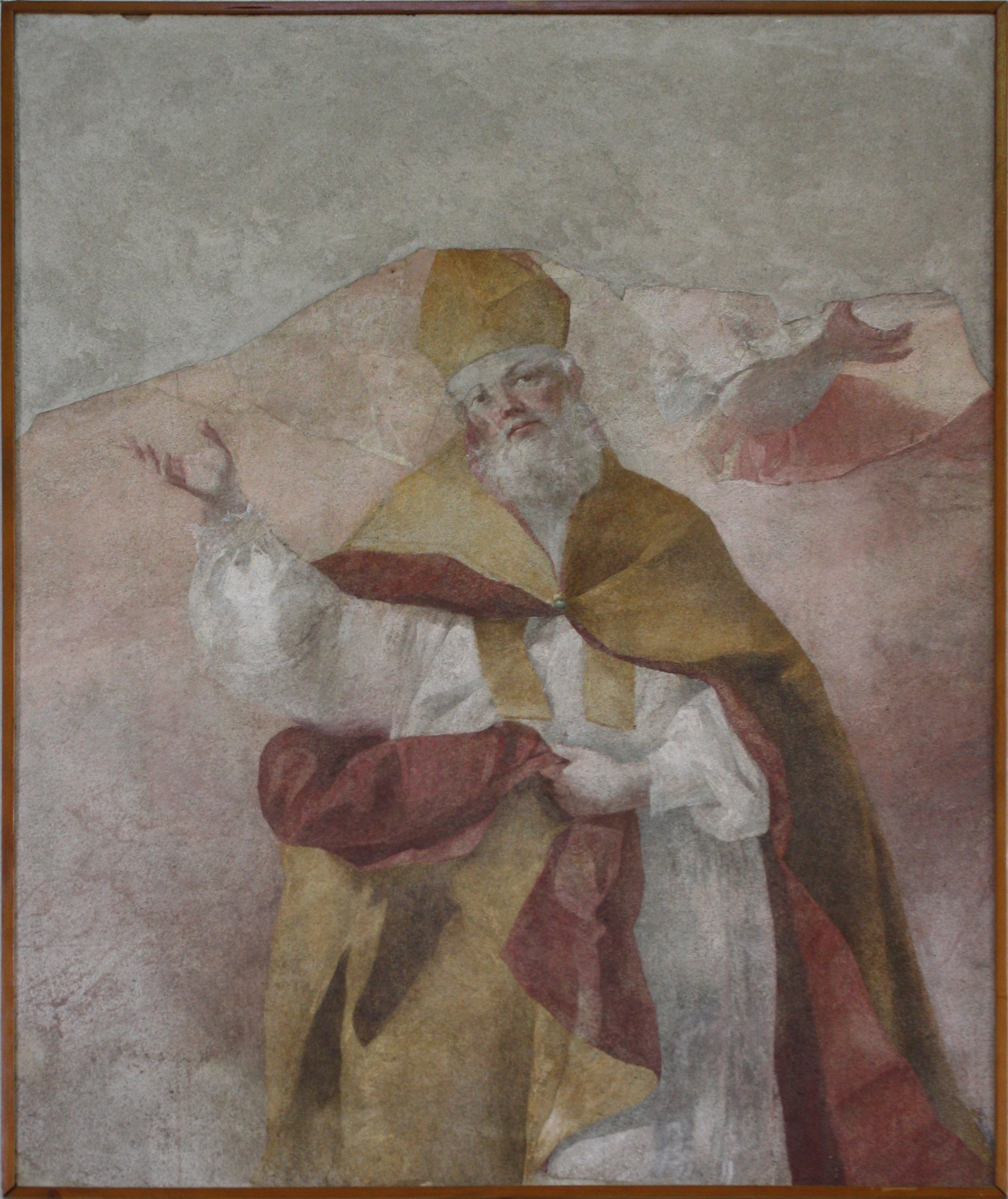 Affresco raffigurante Sant'Ambrogio, opera realizzata da Biagio Bellotti nella chiesa di Sant'Ambrogio di Olgiate Olona. fu successivamente strappato e spostato nella chiesa di San Gregorio Magno, sempre a Olgiate Olona, prima del crollo della sua precedente ubicazione. This is a photo of a monument which is part of cultural heritage of Italy.